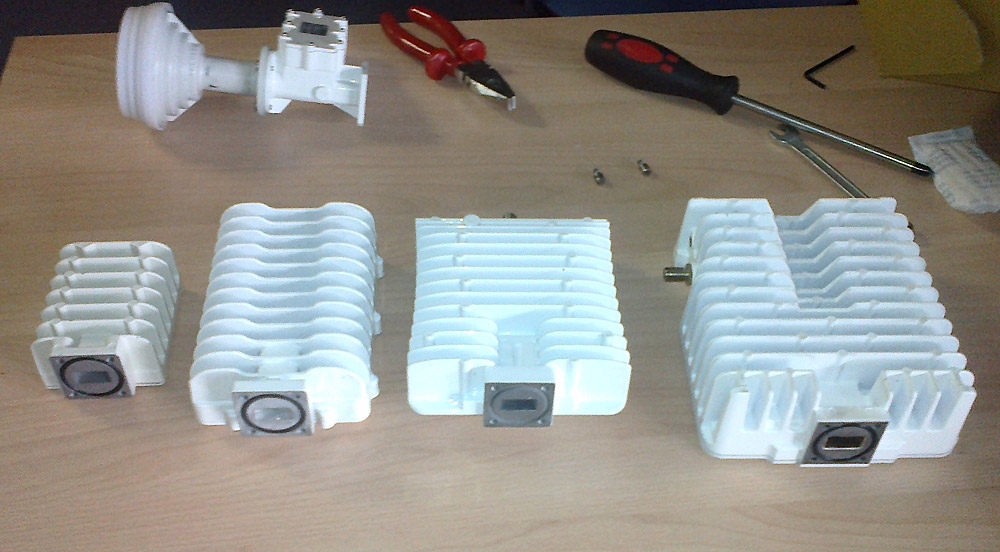 Примеры передающих усилителей-преобразователей (BUC) используемых на абонентских станциях